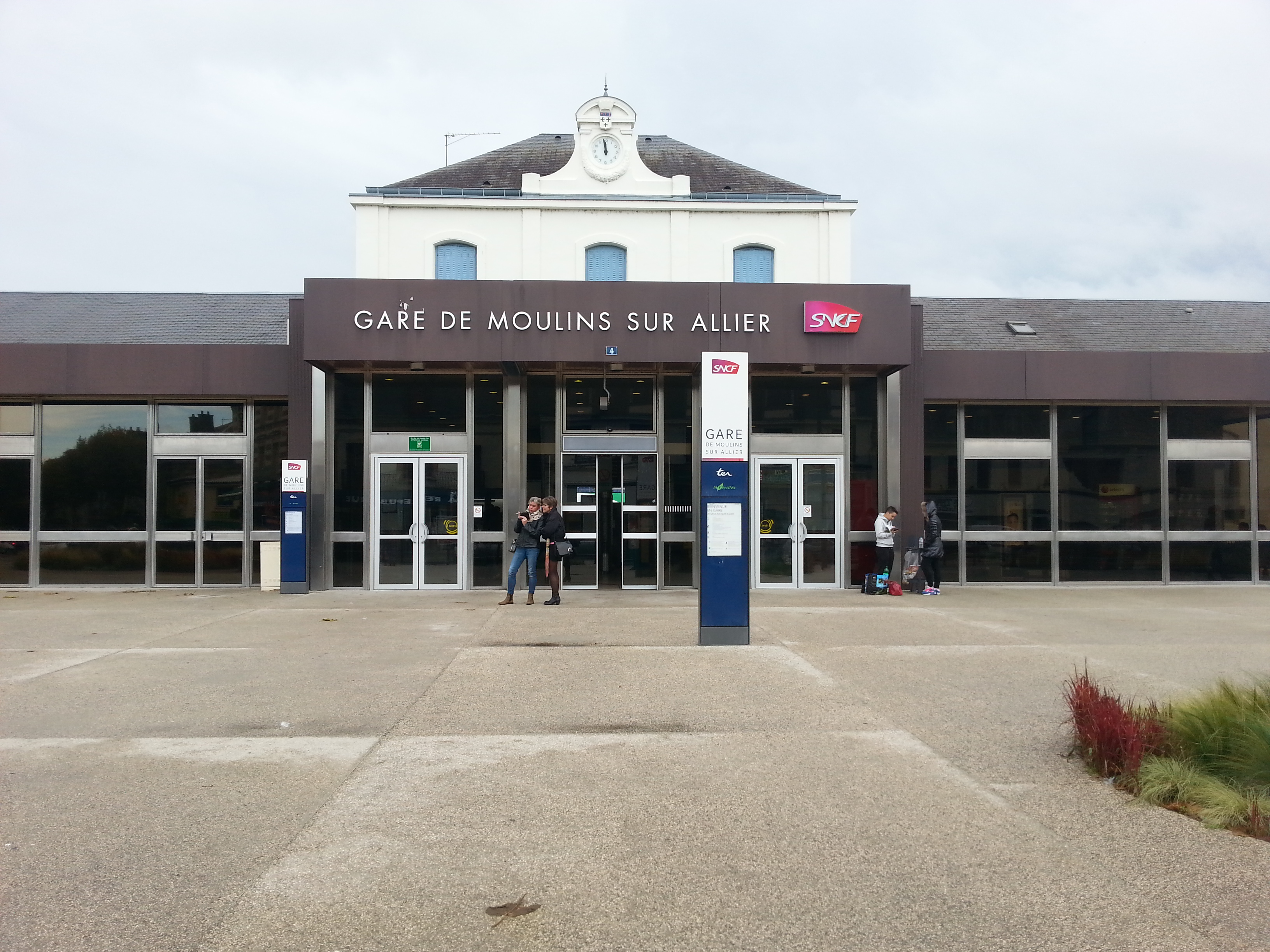 Bâtiment Voyageurs de la gare de Moulins-sur-Allier.